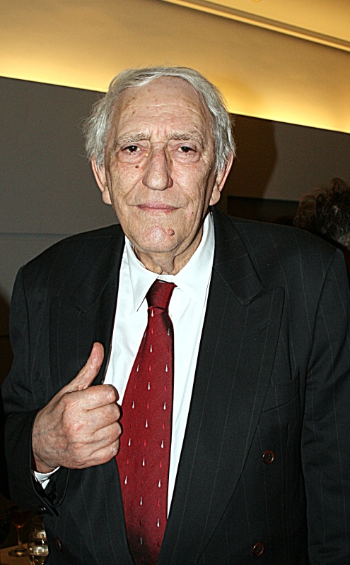 Premijera filma "Nije kraj" u Zagrebu, Ivo Brešan